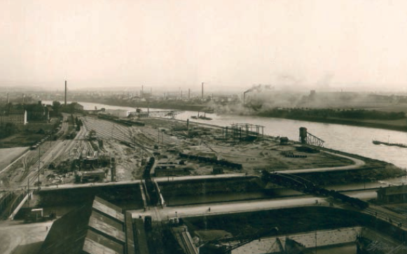 Fertiggestellter Hafenbahnhof Kleinhüningen mit den Hafenanlagen am Klybeck-Quai im Bau